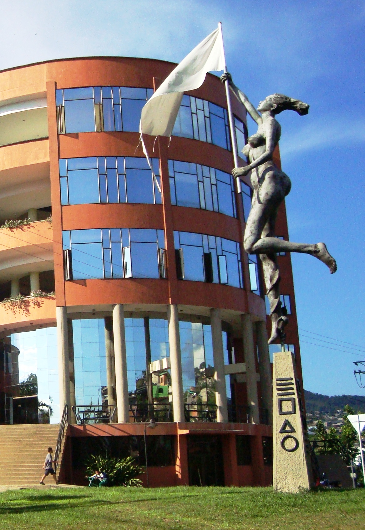 Monumento a la Paz en Florencia, Caquetá